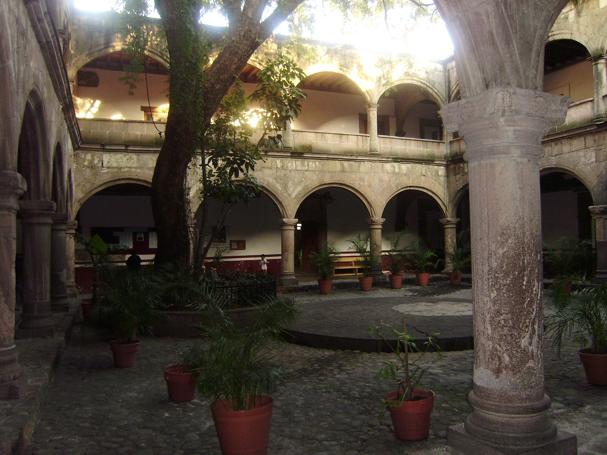 Claustro de la Iglesia de los apóstoles Felipe y Santiago Azcapotzalco, Ciudad de México.